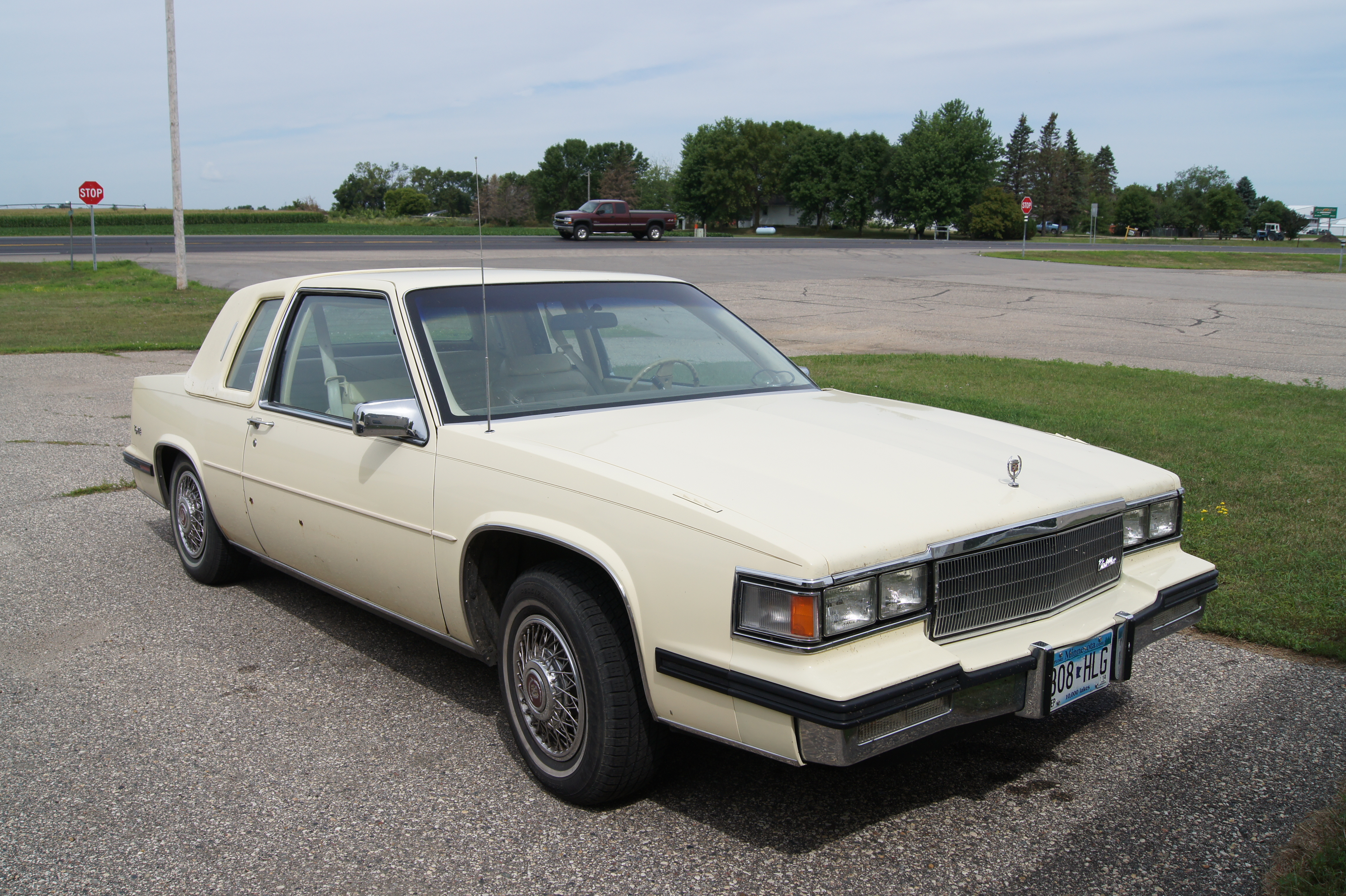 85 Cadillac Coupe de Ville